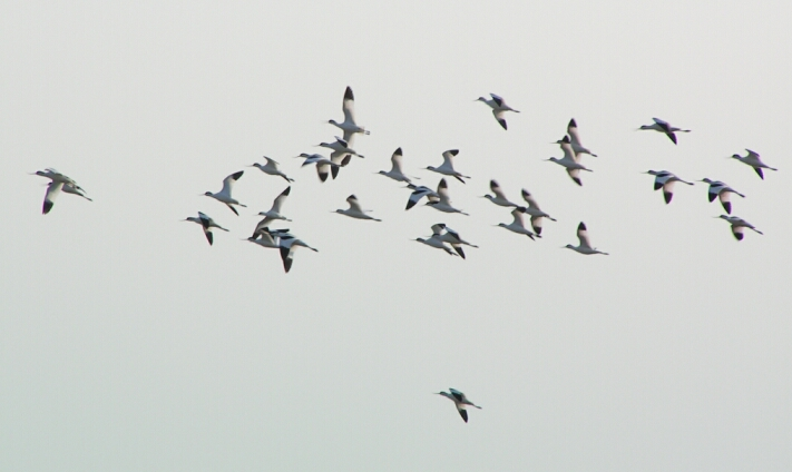 Recurvirostra avosetta